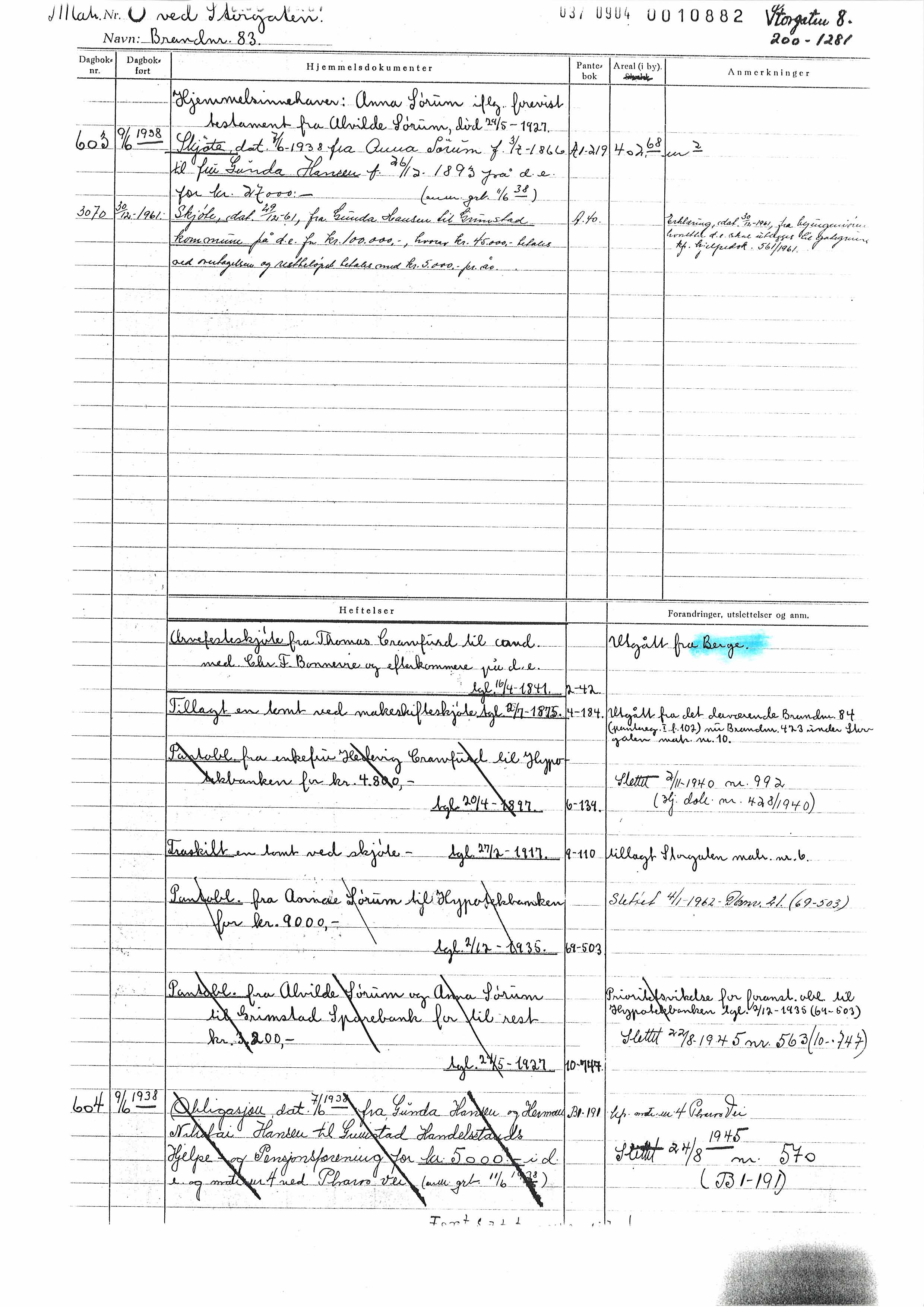 Old "Grunnbok" Example